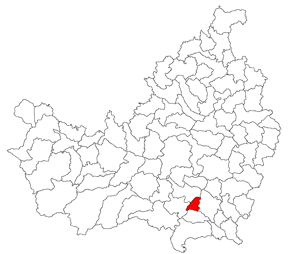 Comuna Sănduleşti, Cluj